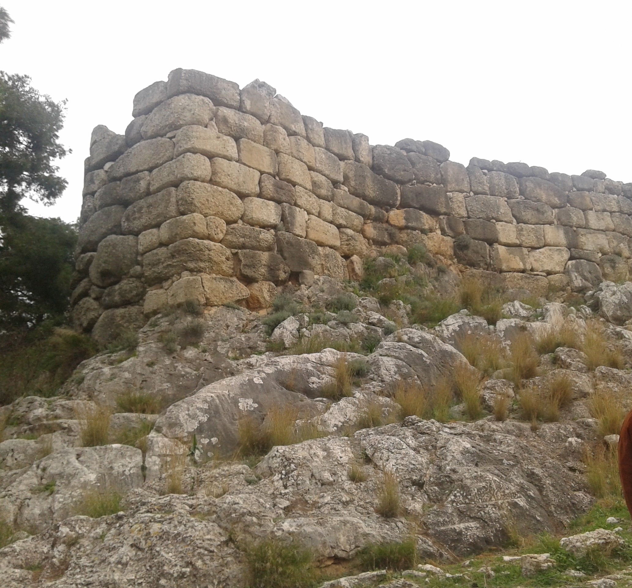 Κυκλώπεια τείχη Μυκηνών«Κυκλώπεια τείχη Μυκηνών»